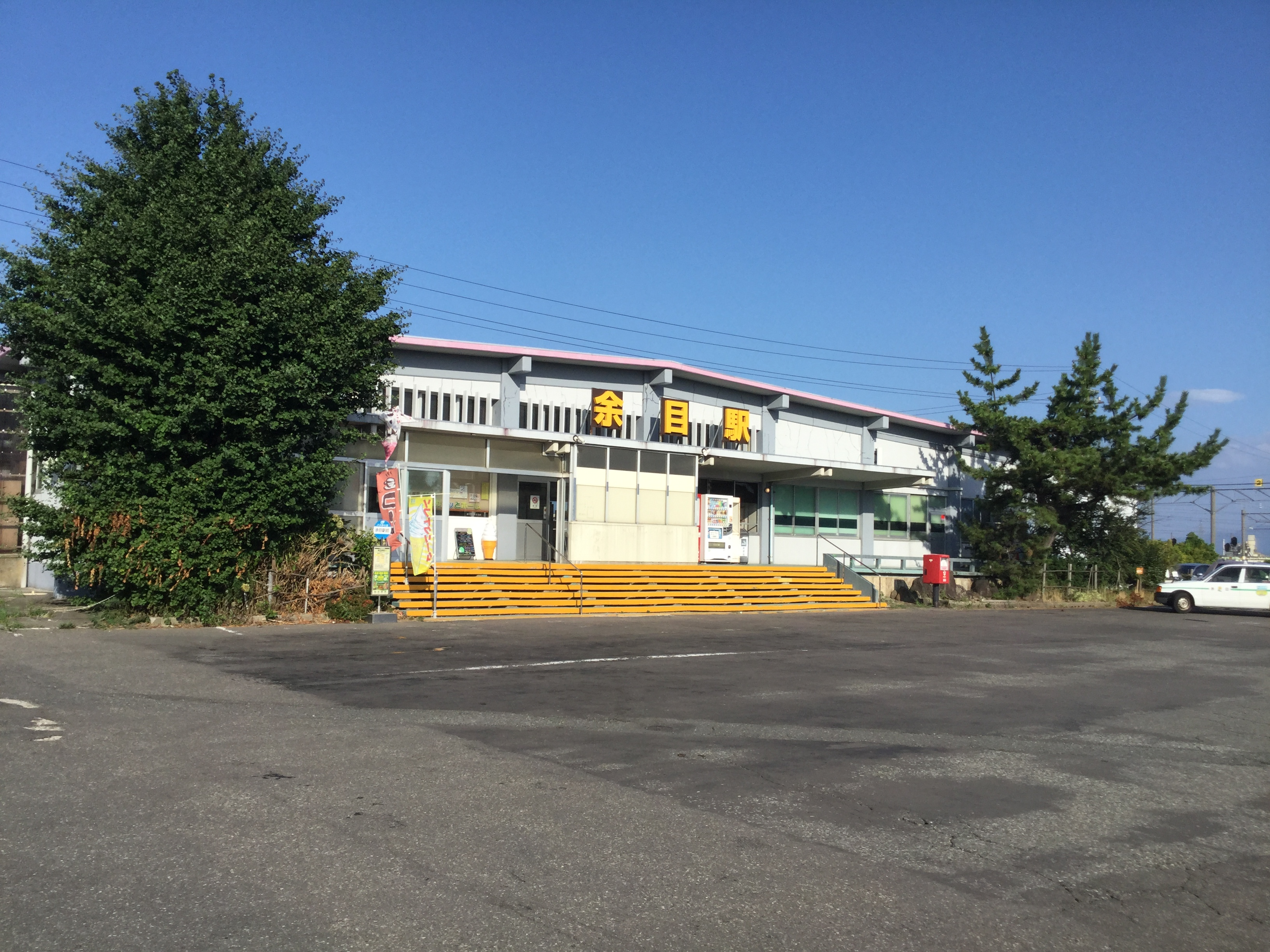 山形県東田川郡庄内町